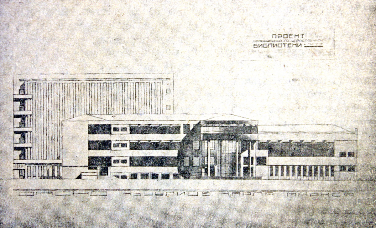 Праект Дзяржаўнай бібліятэкі архітэктара Георгія Лаўрова, канец 1920-х гадоў. Масіўнае кнігасховішча ў левай часцы будынка, пра якое пісаў Шчакаціхін, у выніку так і не будзе пабудавана.